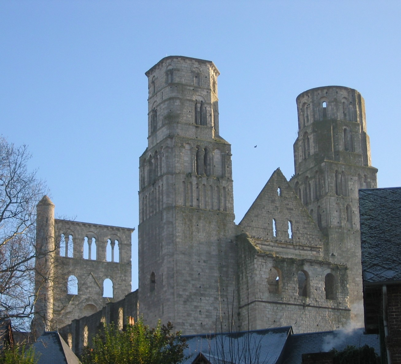 Abbaye de Jumièges, Seine-Maritime, Haute-Normandie